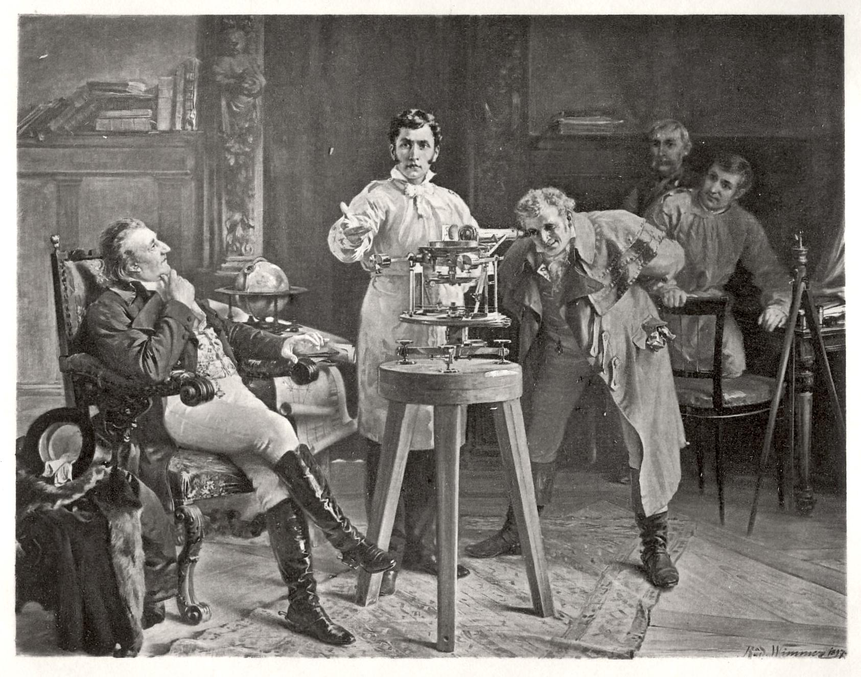 Joseph von Fraunhofer demonstrating the spectroscope. On left Joseph von Utzschneider, on right Georg Friedrich von Reichenbach. Photogravure from a painting by Richard Wimmer.